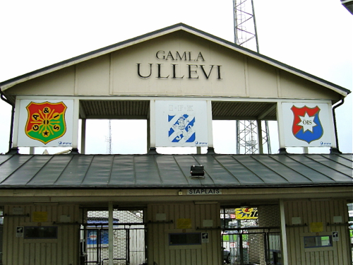 Gamla Ullevis entré med de tre allianslagens (Gais, IFK Göteborg och Örgryte IS) klubbmärken 2005.